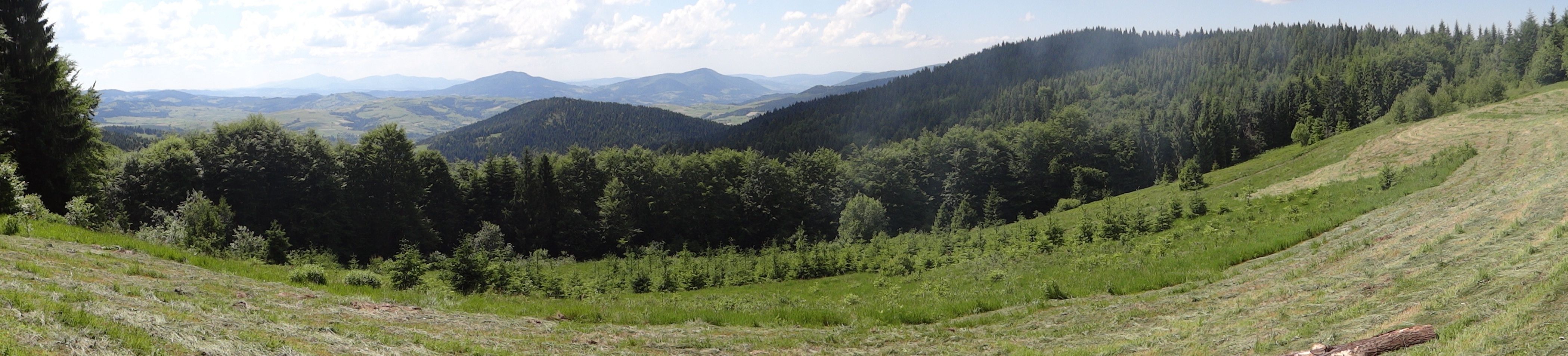 Polana Folwarczna - panorama